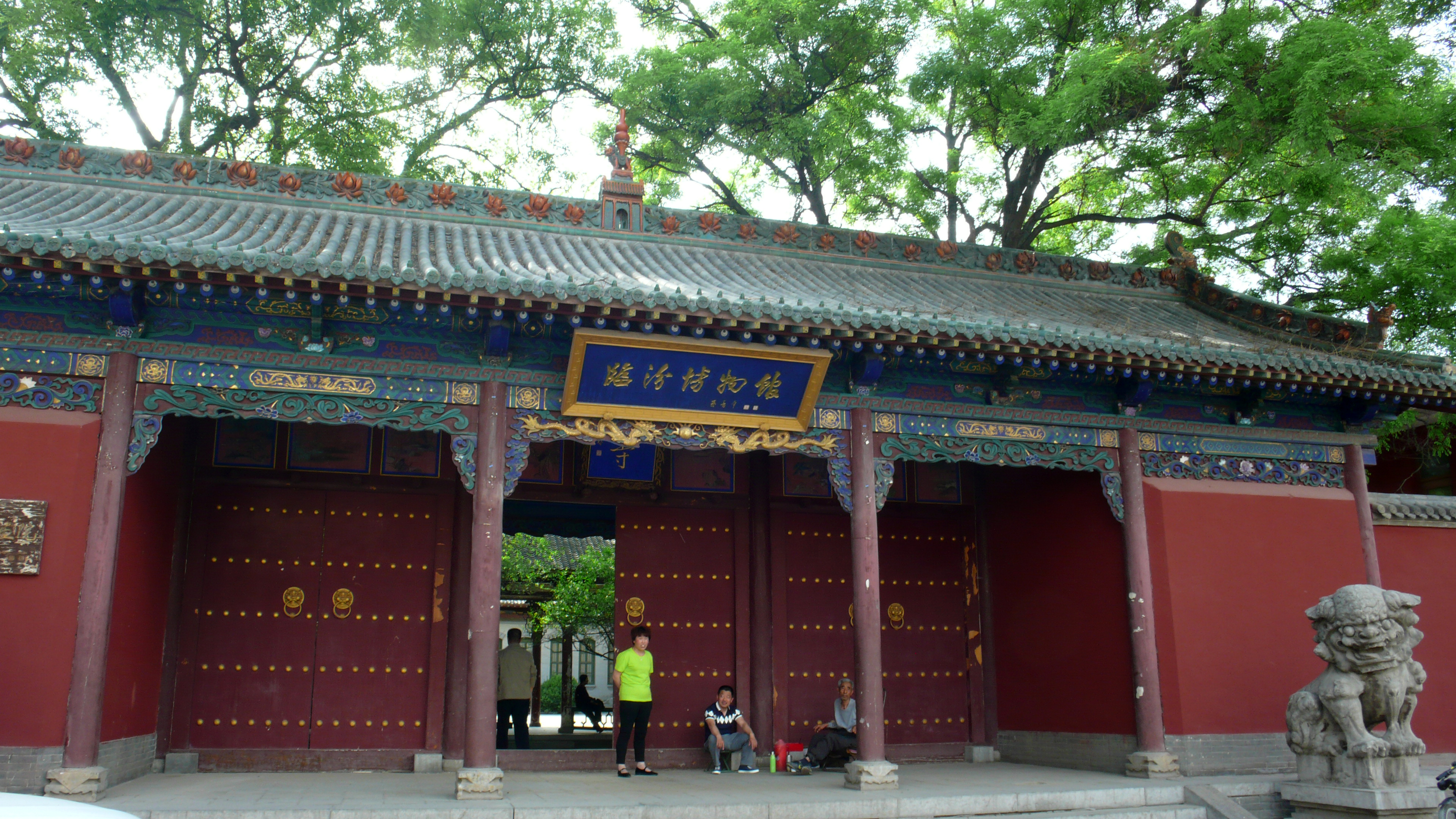 临汾博物馆大门。